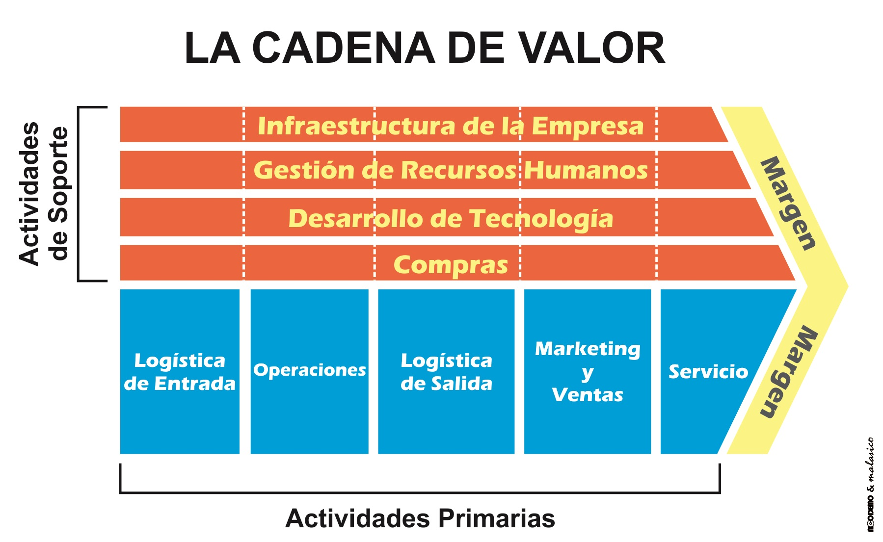 Diagrama de la Cadena de Valor de Michael Porter